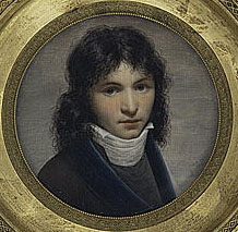 Portrait d'Aimé Picquet du Boisguy (1776-1839)